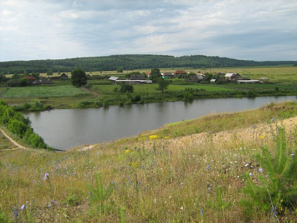 с.Эзекеево Николаевского р-на Ульяновской области